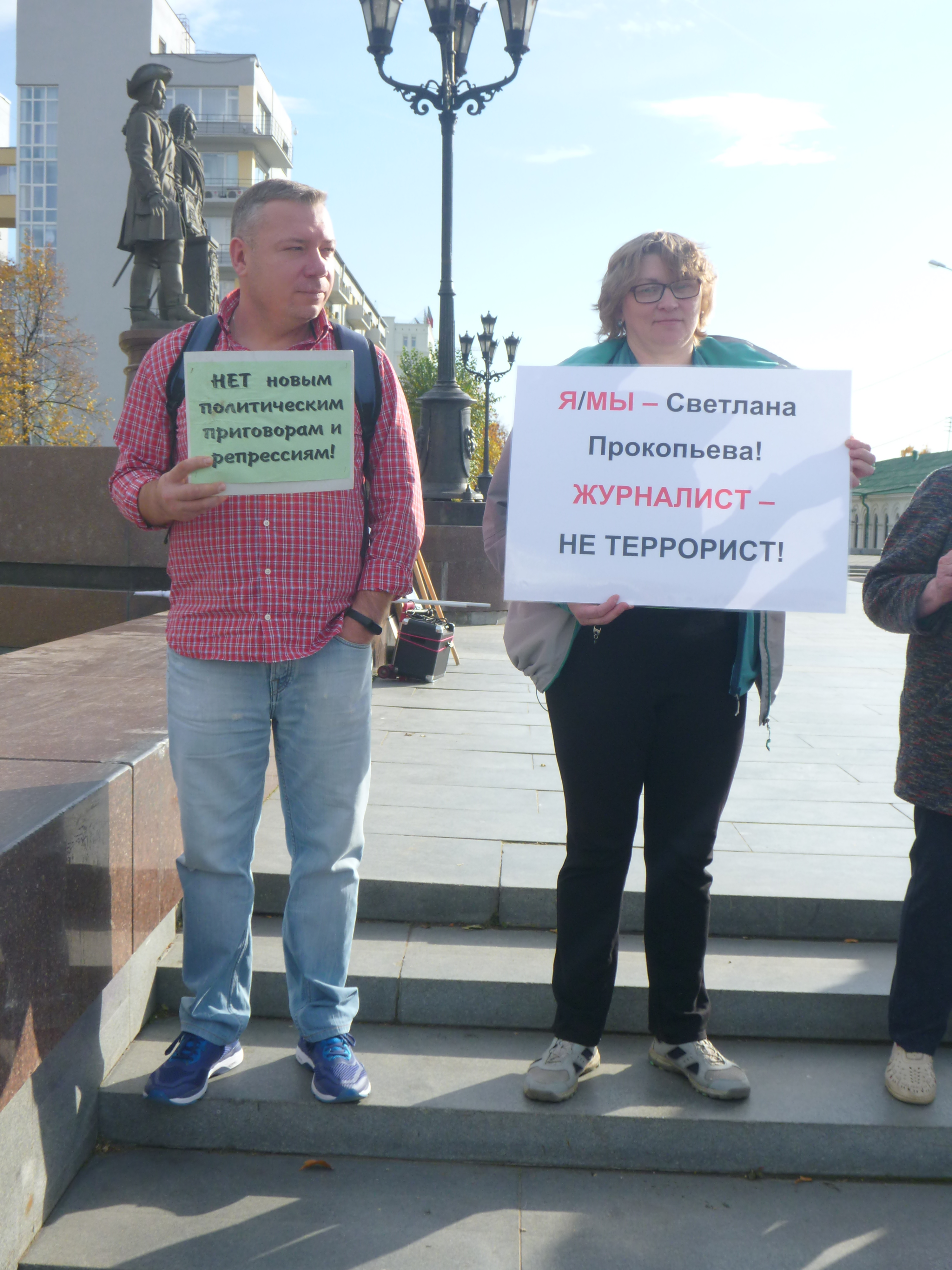 Виктор Бармин в пикете за политзаключенных Екатеринбург 6 октября 2019 года